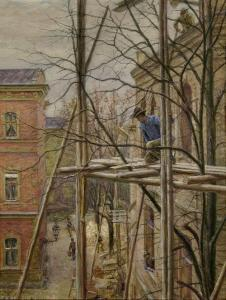 Alexander Schmidt-Michelsen: Leipziger Straßenszene: Bau an einem Wohnhaus. Aquarell und Deckfarben über Bleistift, auf Malpappe. 65 x 50,5 cm